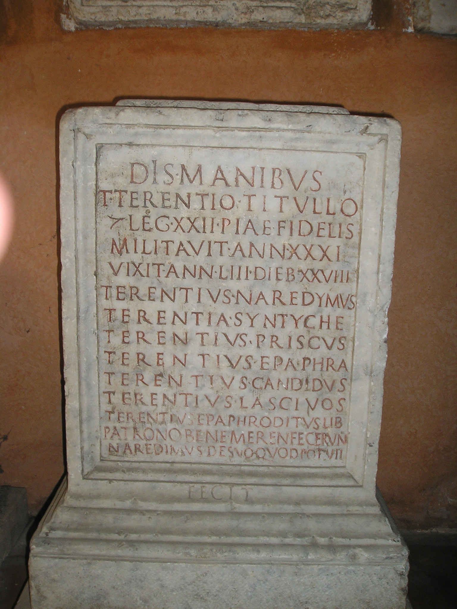 Estela funeraria del centurión de la Legión XXII Primigenia T. Terentio Tullo. CIL VI, 3634